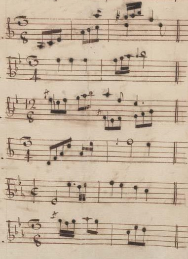 Table du volume II des manuscrits de Venise (incipit des sonates 17 à 22, K. 188 à 193).